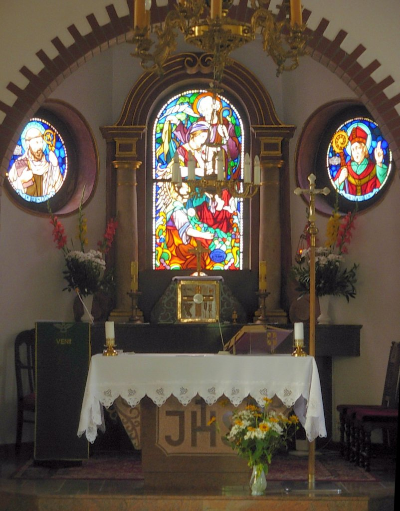 Kościół św Stanisława w Bydgoszczy